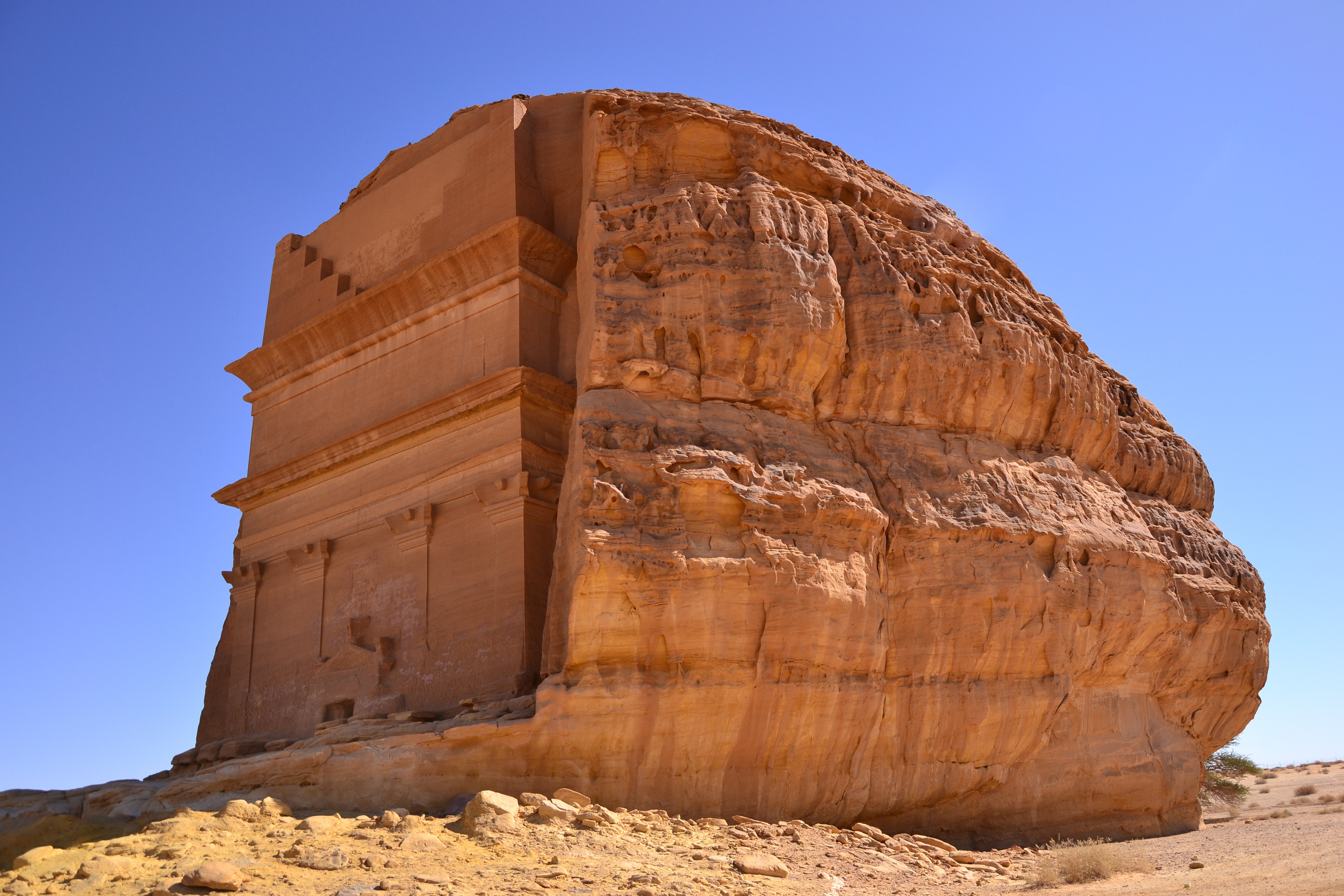 Madain Saleh